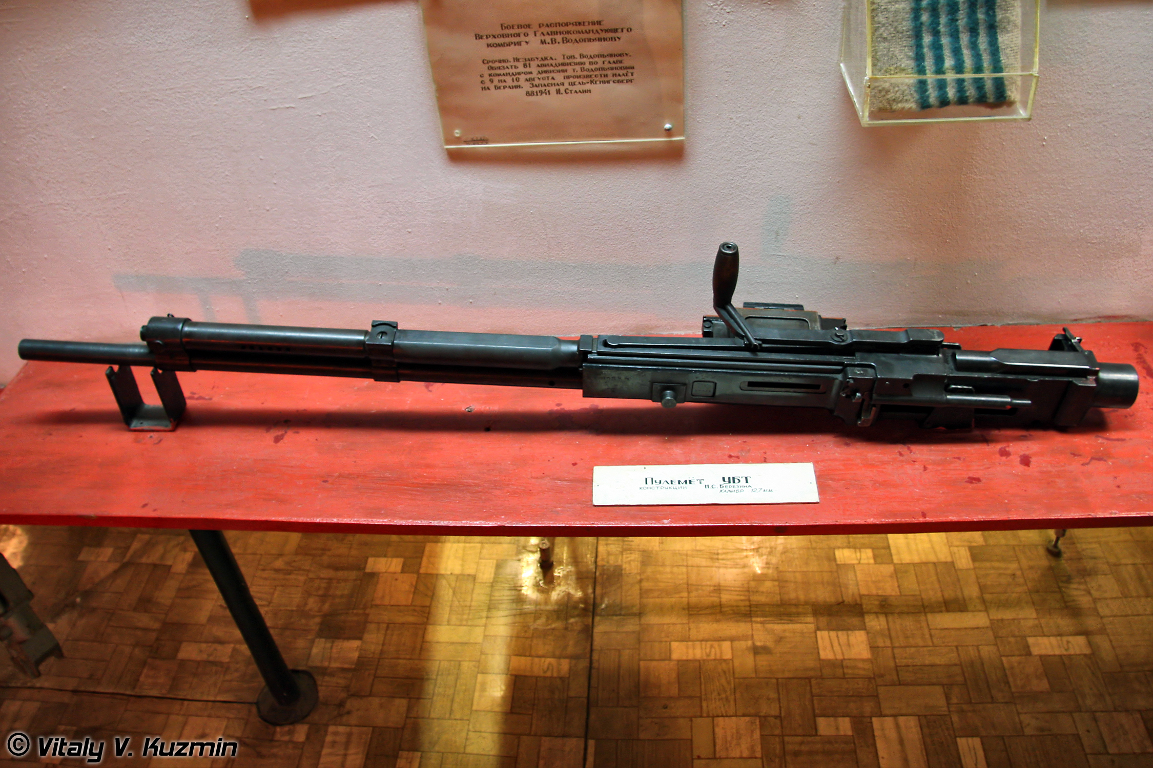 12,7 мм пулемет УБТ (12,7 mm machine gun UBT)